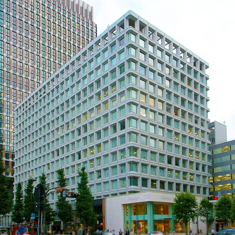 2009.5日本国内で塾生 (talk)が撮影。